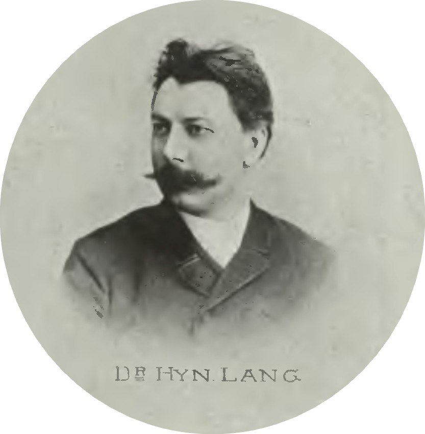 Portrét – Hynek Lang (1847 - 1926), Český právník a politik.